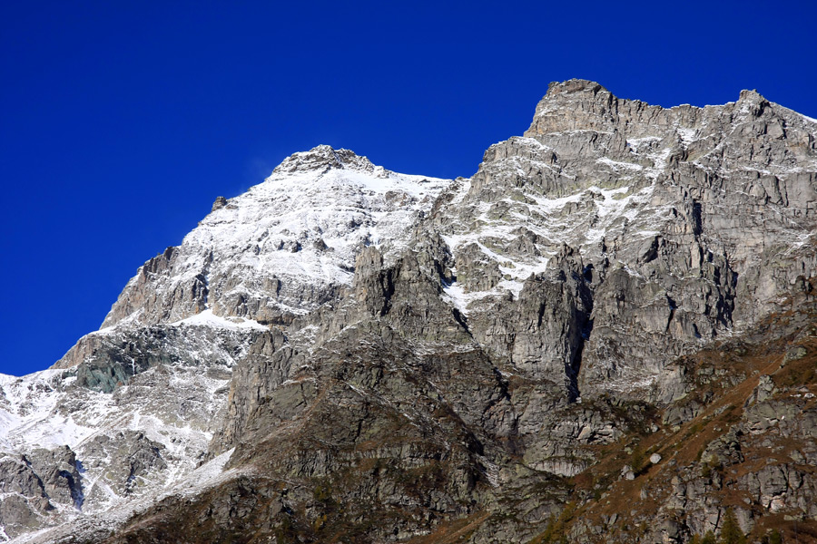 Il Monte Cervandone visto dalla Piana di Devero